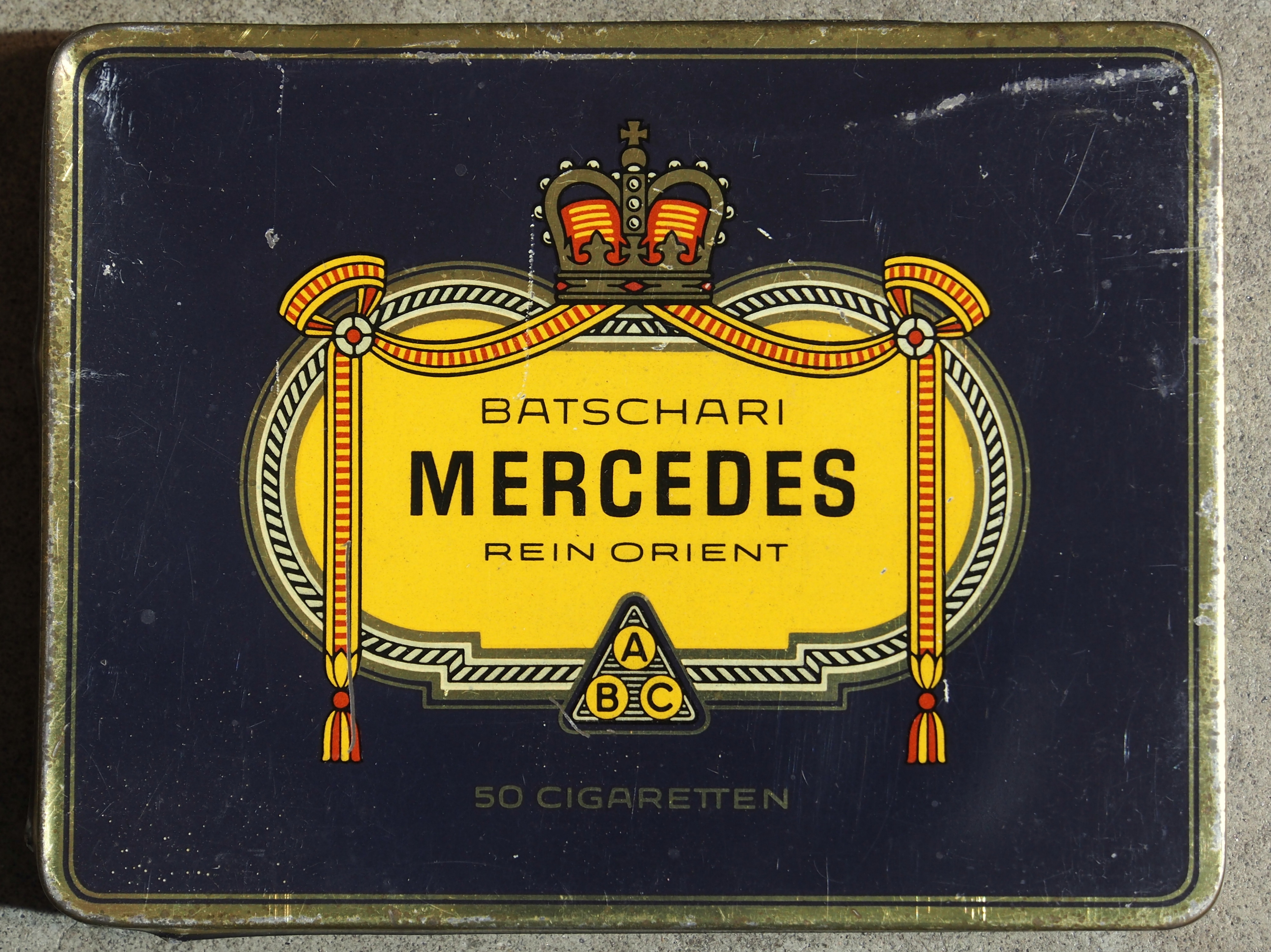 Batschari Mercedes Rein orient.